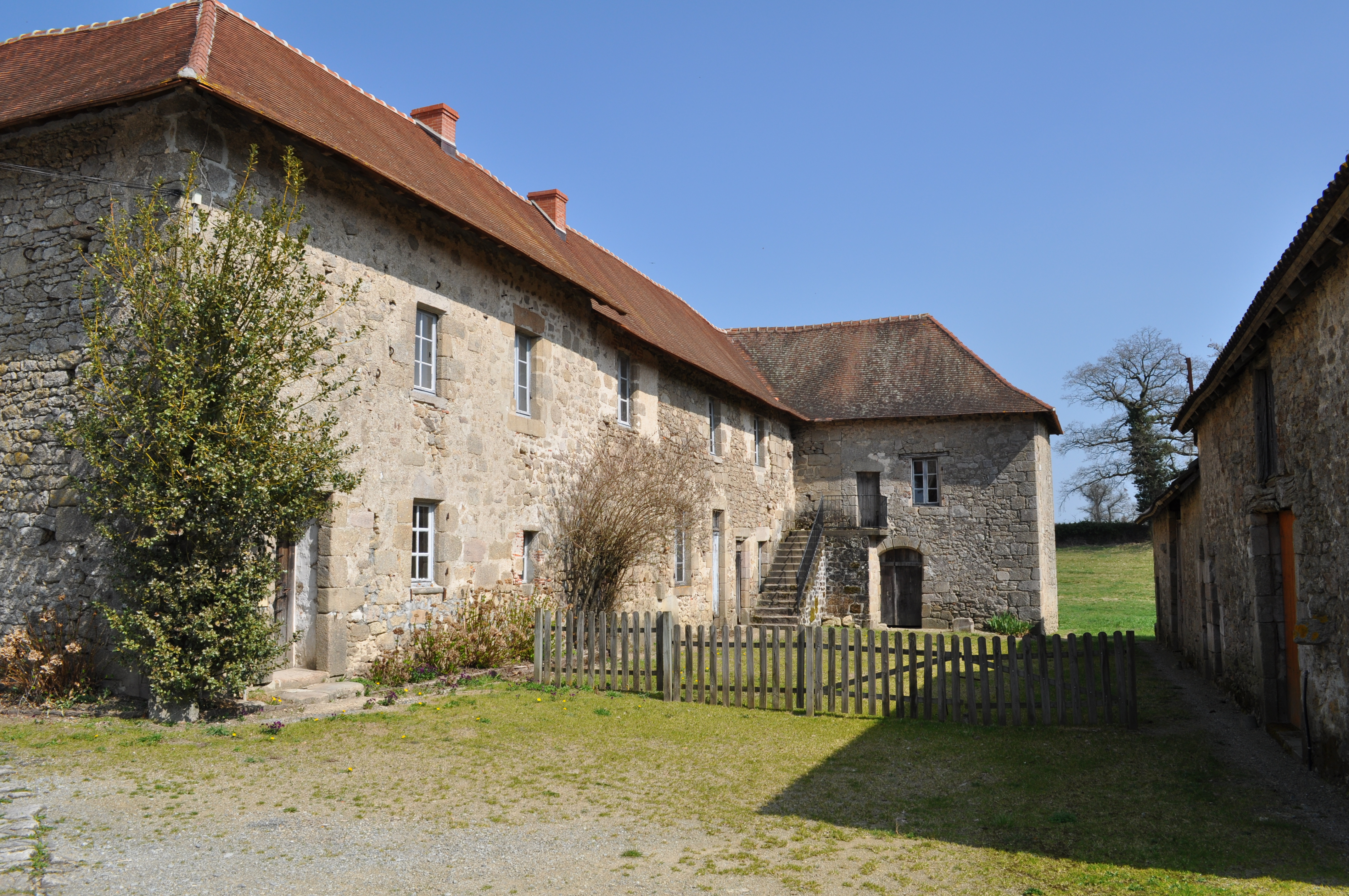 Le prieuré des Bronzeaux